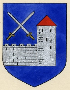 Virumaa vana vapp